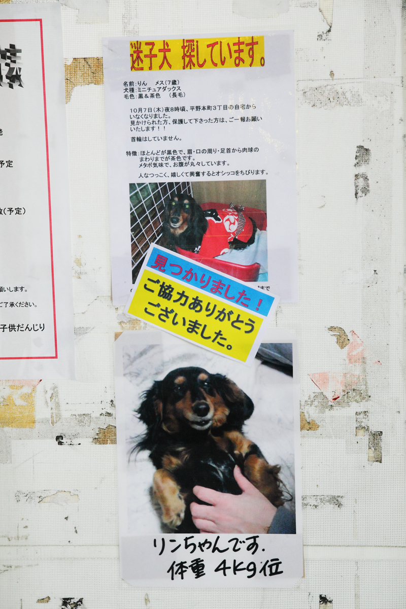 街の商店街で嬉しいことを発見。思わずスナップ。 善因善果。良かったですね。